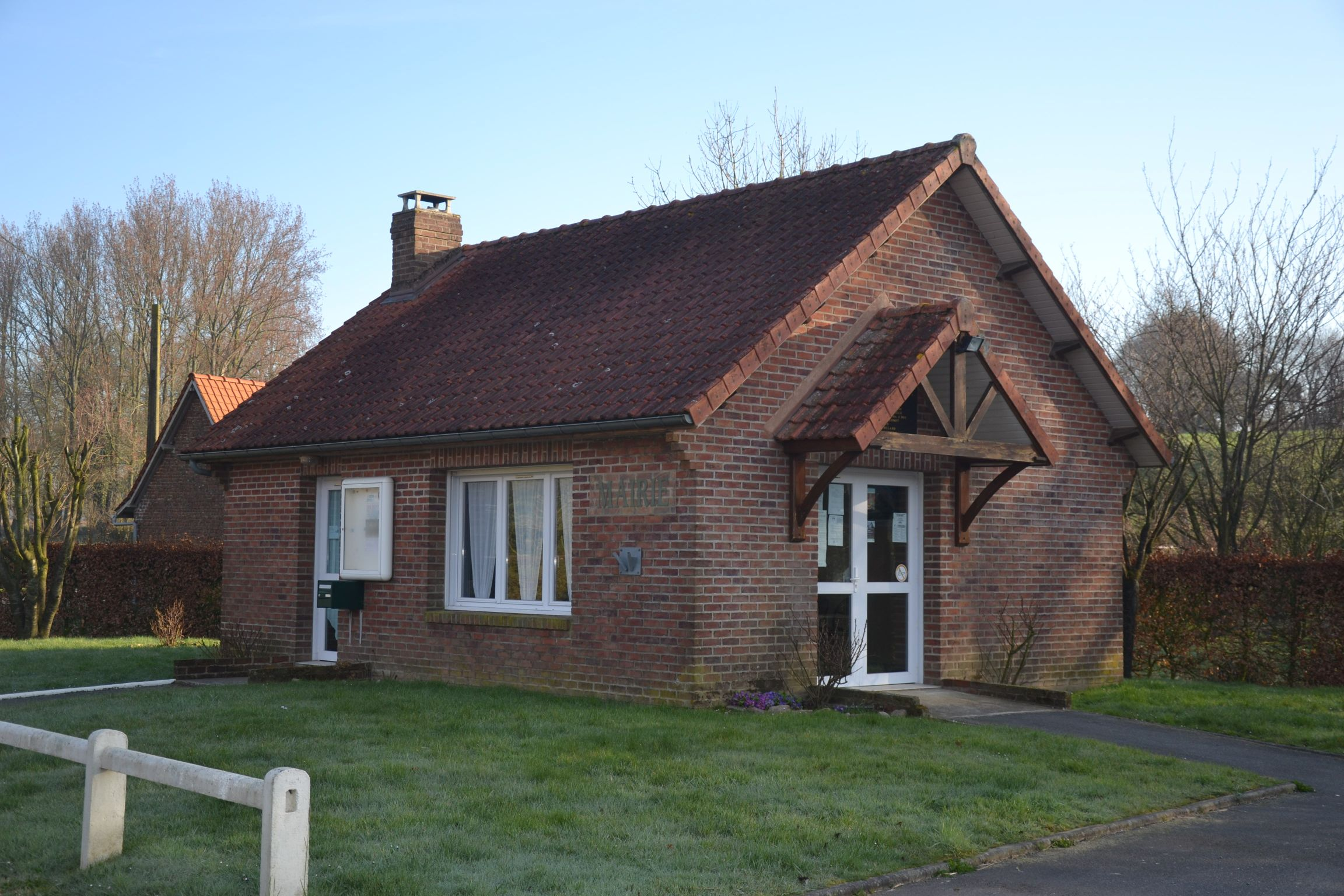 Mairie d'Avondance